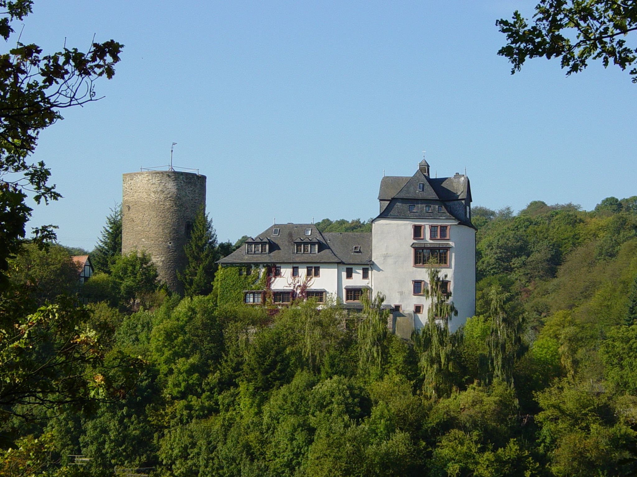 Burg in Cleeberg (1150, Privatbesitz), Ortsteil von Langgöns, fotografiert vom gegenüberliegenden Hügel Cleebaum